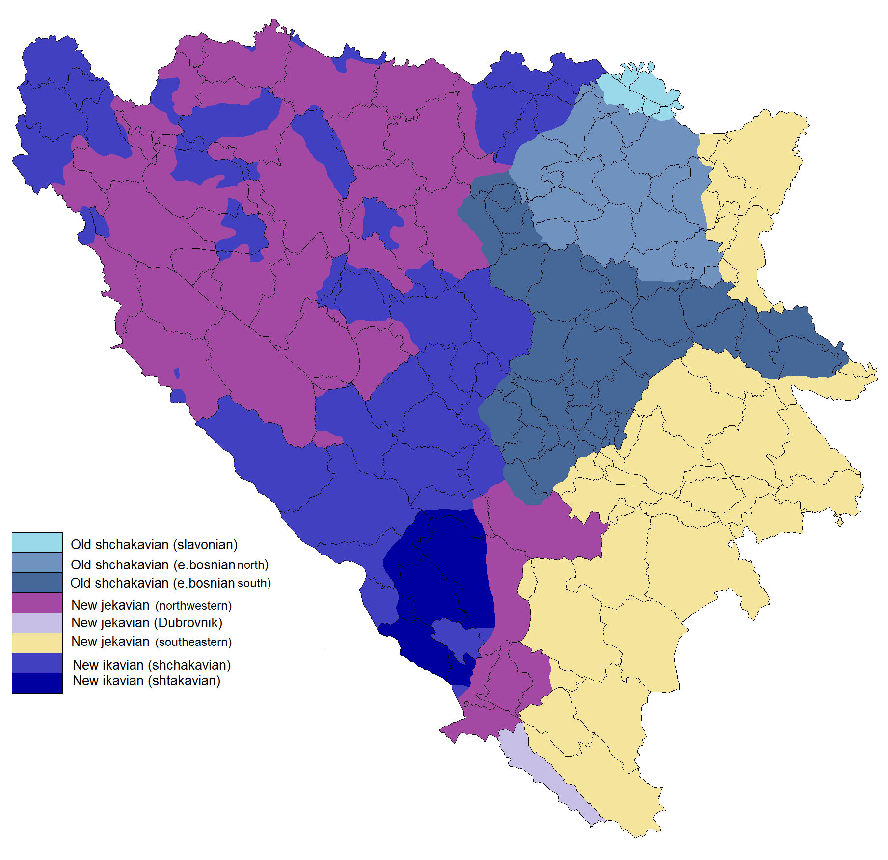 Štokavski poddijalekti u BiH